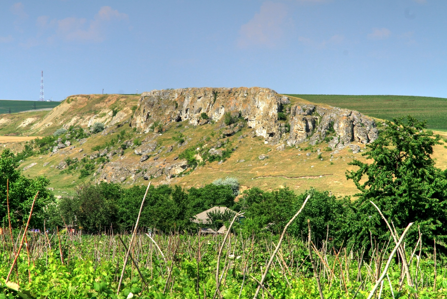 Стынка Маре, монумент природы, находится в Глоденский район, У с. Кобань (код MD-GL-mn.A-039) A-039